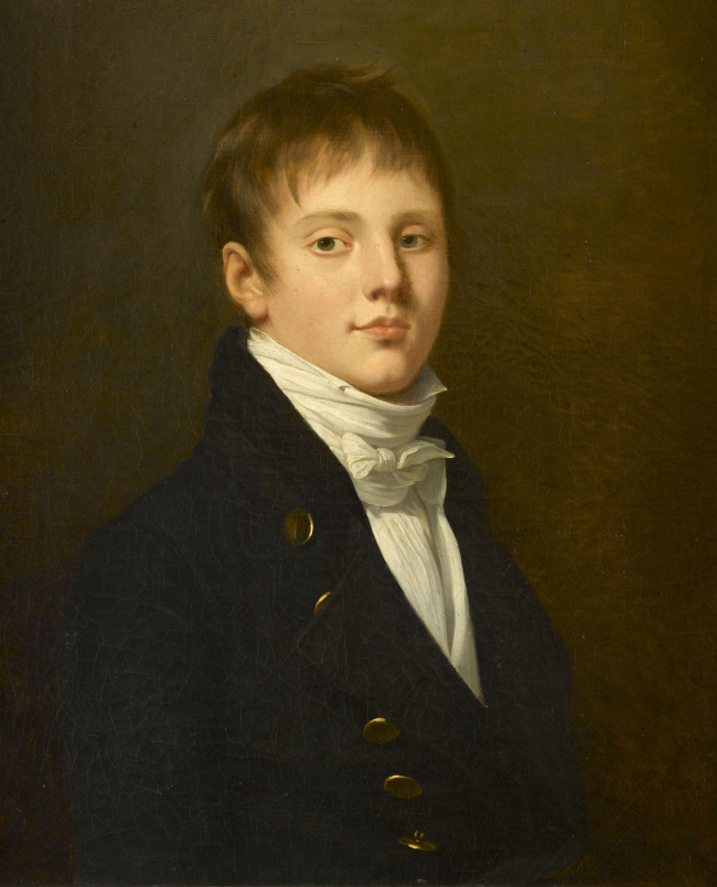 Charles-Angélique-François Huchet, comte de La Bédoyère (1786-1815), French general and Napoleon's adjudant.